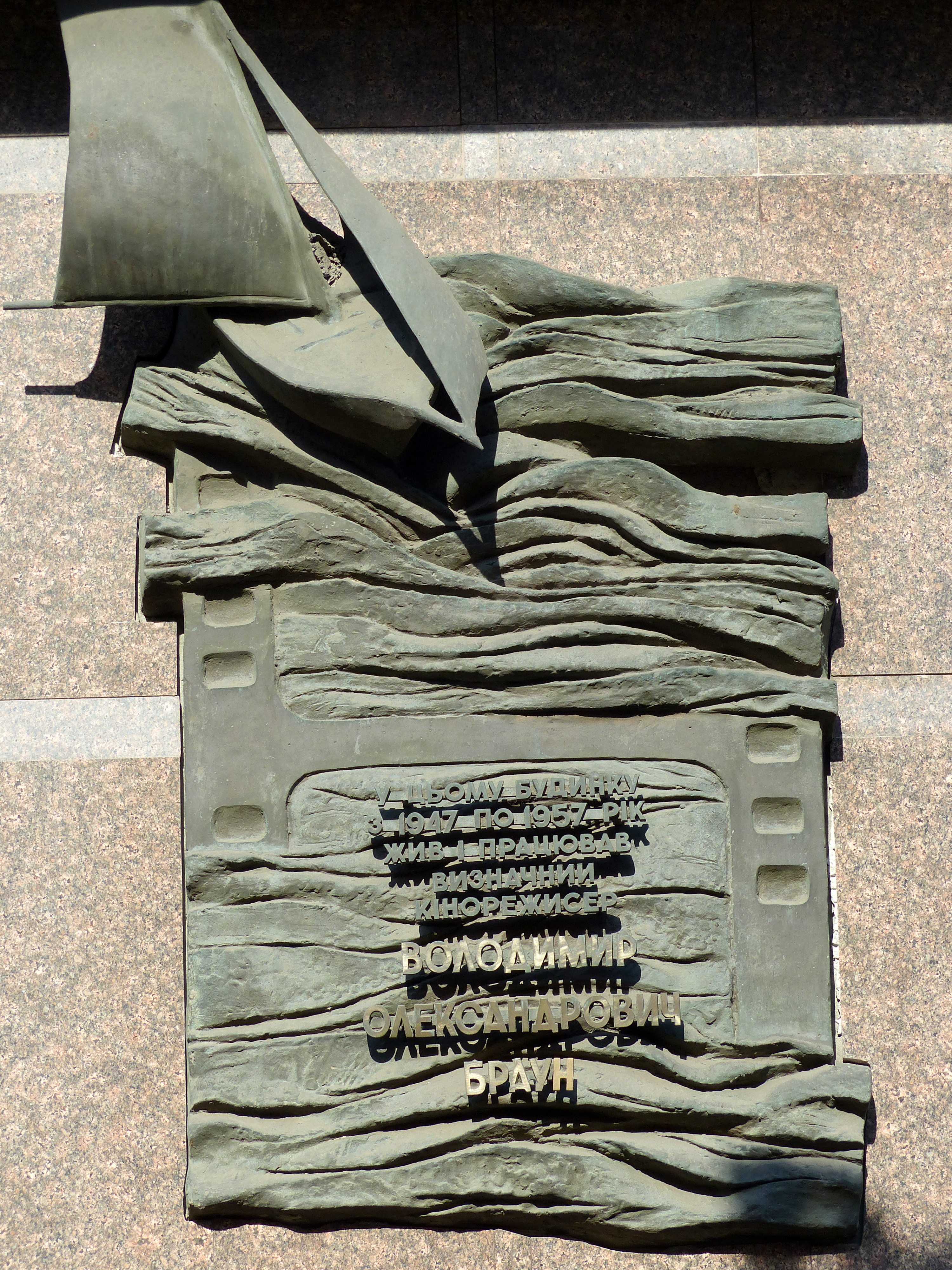 Будинок Київської кіностудії, в якому мешкали: у 1947–1954 роках Д. П. Демуцький, кінооператор, заслужений діяч мистецтв; у 1939–1941 роках — П. П. Вершигора, кінорежисер, поет, один з командирів партизанського з'єднання С. А. Ковпака, Герой Радянського Союзу, письменник, Київ, Саксаганського вул., 24/25